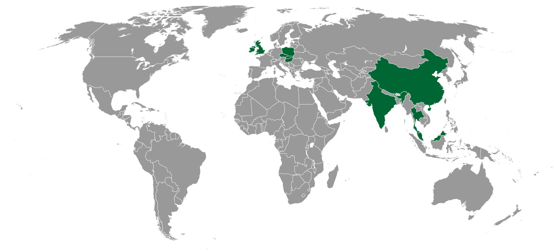 Tesco v roce 2018